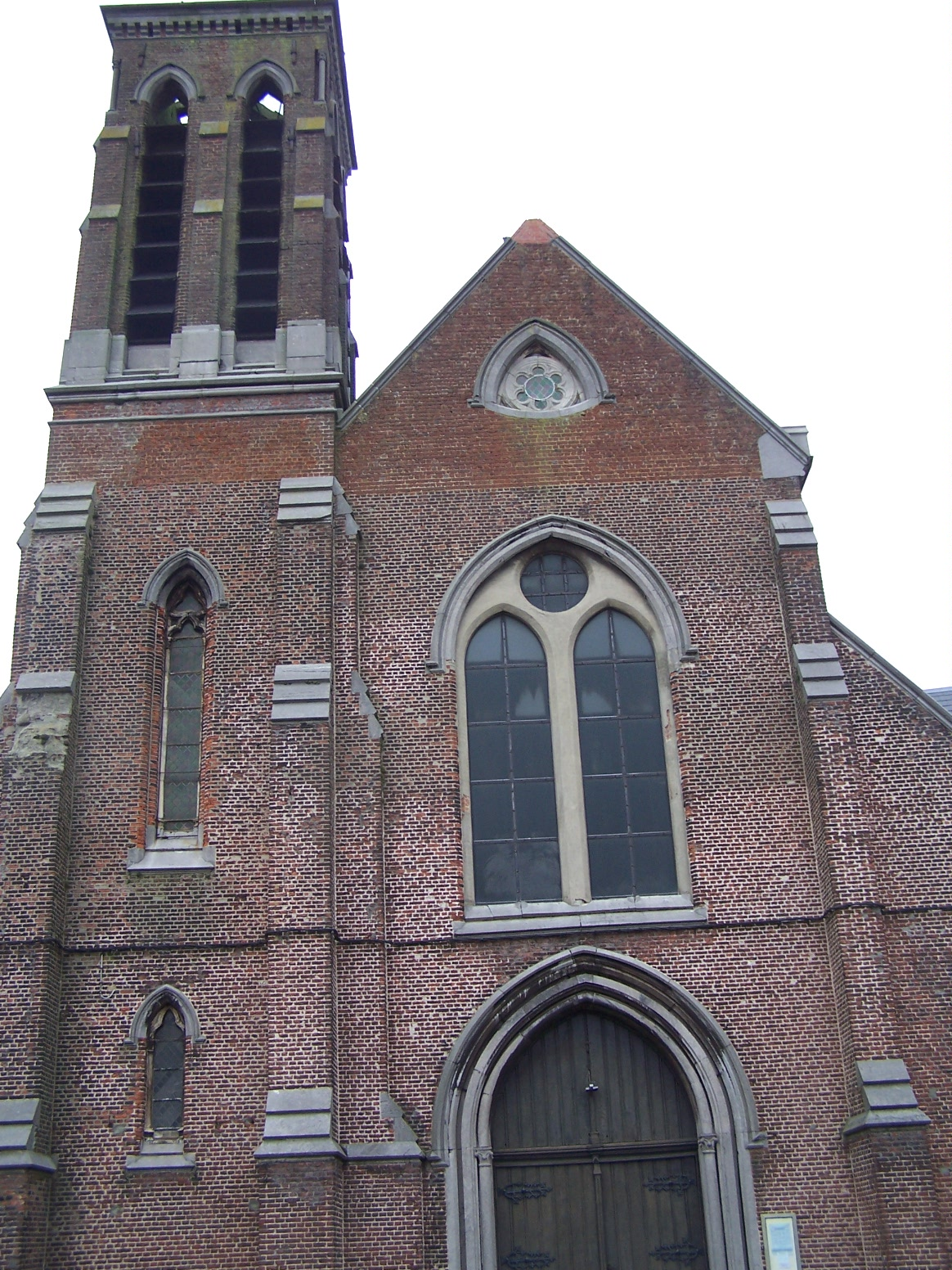 Église de la ville de bois d'haine